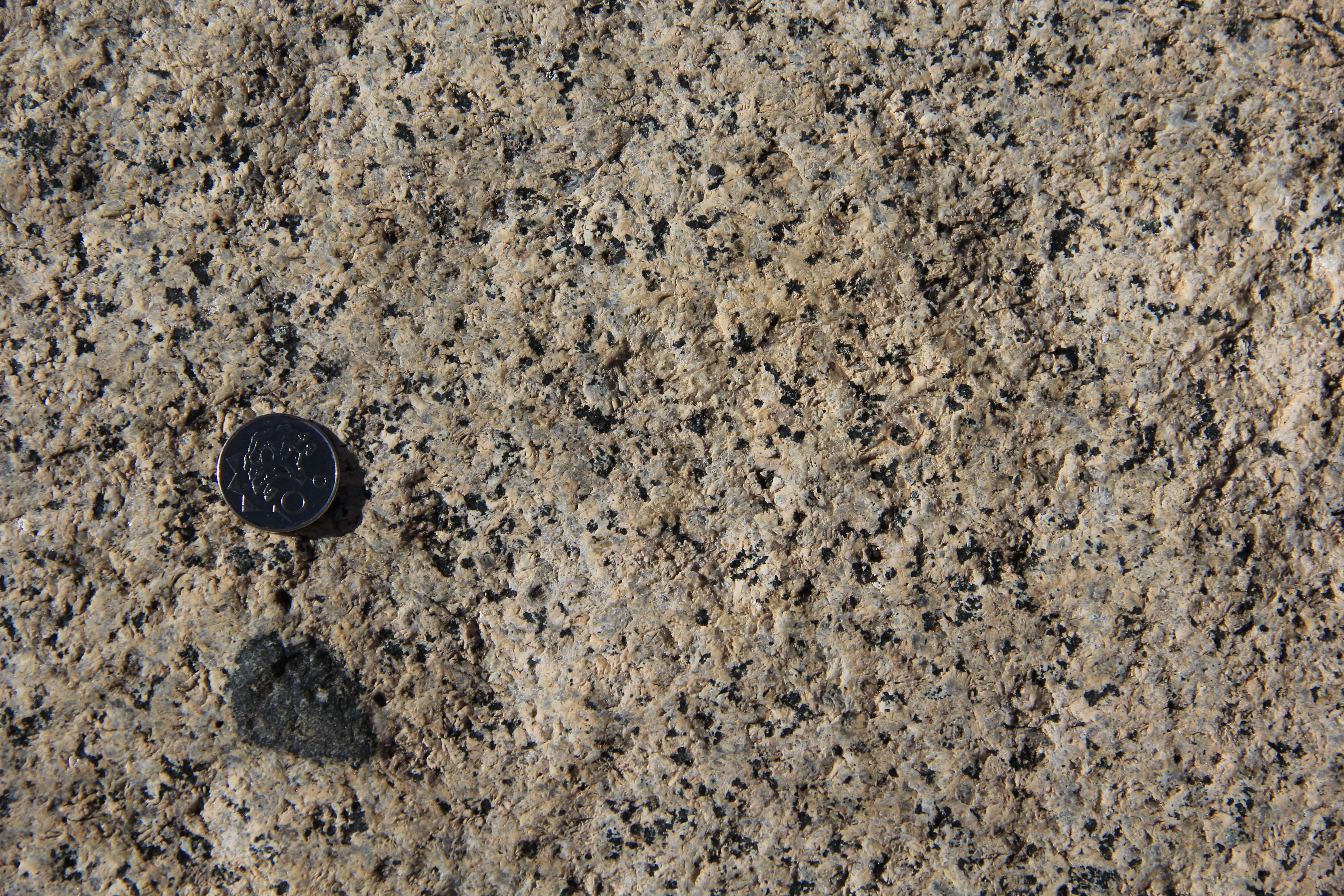 Detailaufnahme des Hornblende (Edenit) führenden Granits in der Tsisab-Schlucht im Brandbergmassiv, Namibia. Der Durchmesser der Münze beträgt 21 mm.